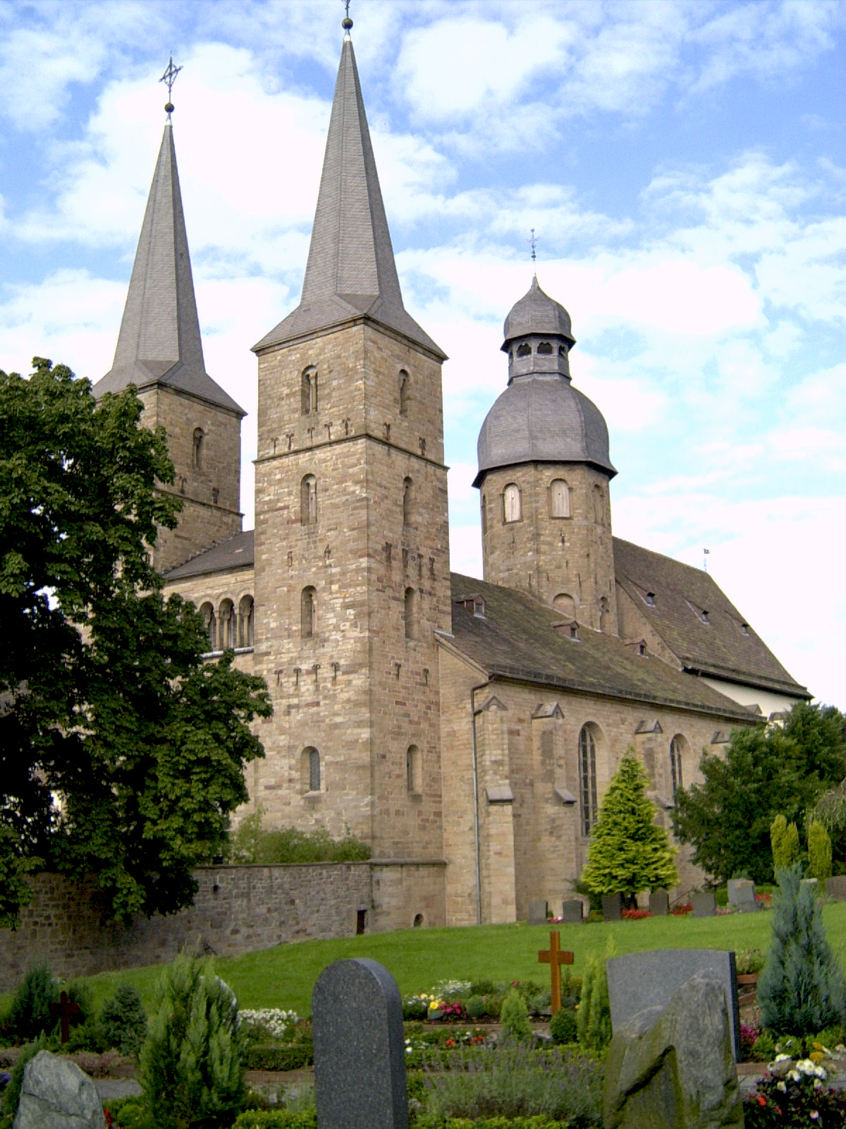 Former abbey church Marienmuenster, Marienmuenster, Kreis Hoexter, Germany